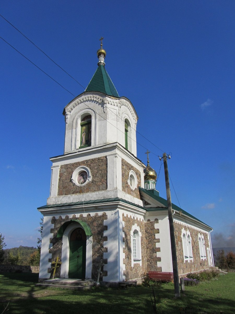 Лоск. Царква